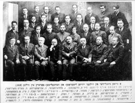 Photo de groupe de l'Union des Ecrivains et Journalistes de langue yiddish de Wilno en 1938. Moshe Shalit, président de l'Union, est assis au premier rang, cinquième à partir de la gauche. La légende de la photographie est écrite en yiddish en caractères hébraïques. Contents 1 Source 2 Licensing 3 Licensing 4 Original upload log Source Cette photographie a exactement 70 ans. Elle est originaire de Wilno, Lituanie (Europe).Elle est, désormais, dans le domaine public. Elle appartenait au YIVO (Centre culturel et scientifique) basé à Wilno dont Moshe Shalit(sujet de l'article) était le président. Après la destruction du YIVO par les nazis, cette photo, prise en 1938, a été reproduite dans plusieurs pays (notamment aux Etats-Unis qui l'ont éditée mais ils ne sont sûrement pas les seuls) et elle est visible, bien entendu, au Musée de la Mémoire de Vilnius. Son auteur a été englouti dans la tourmente. Licensing Cette image a exactement 70 ans. Elle est donc dans le "domaine public". Elle vient de Lituanie (Europe).